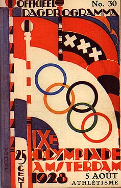 Omslag van het programma van de Olympische Spelen van 1928.